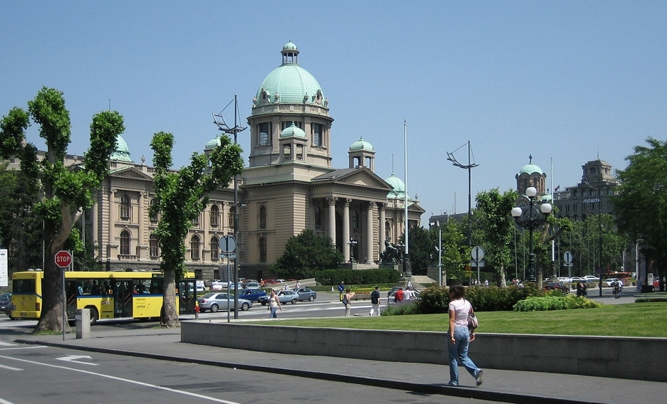 Parlament de Serbie à Belgrade